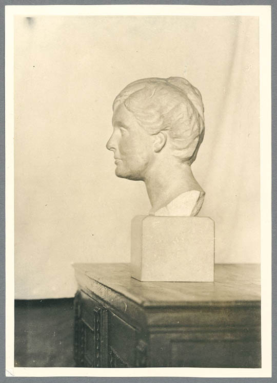 Porträt der Martha von Bethmann Hollweg, geb. von Pfuel, 1910, Marmor. Büste von Georg Kolbe (1877-1947).